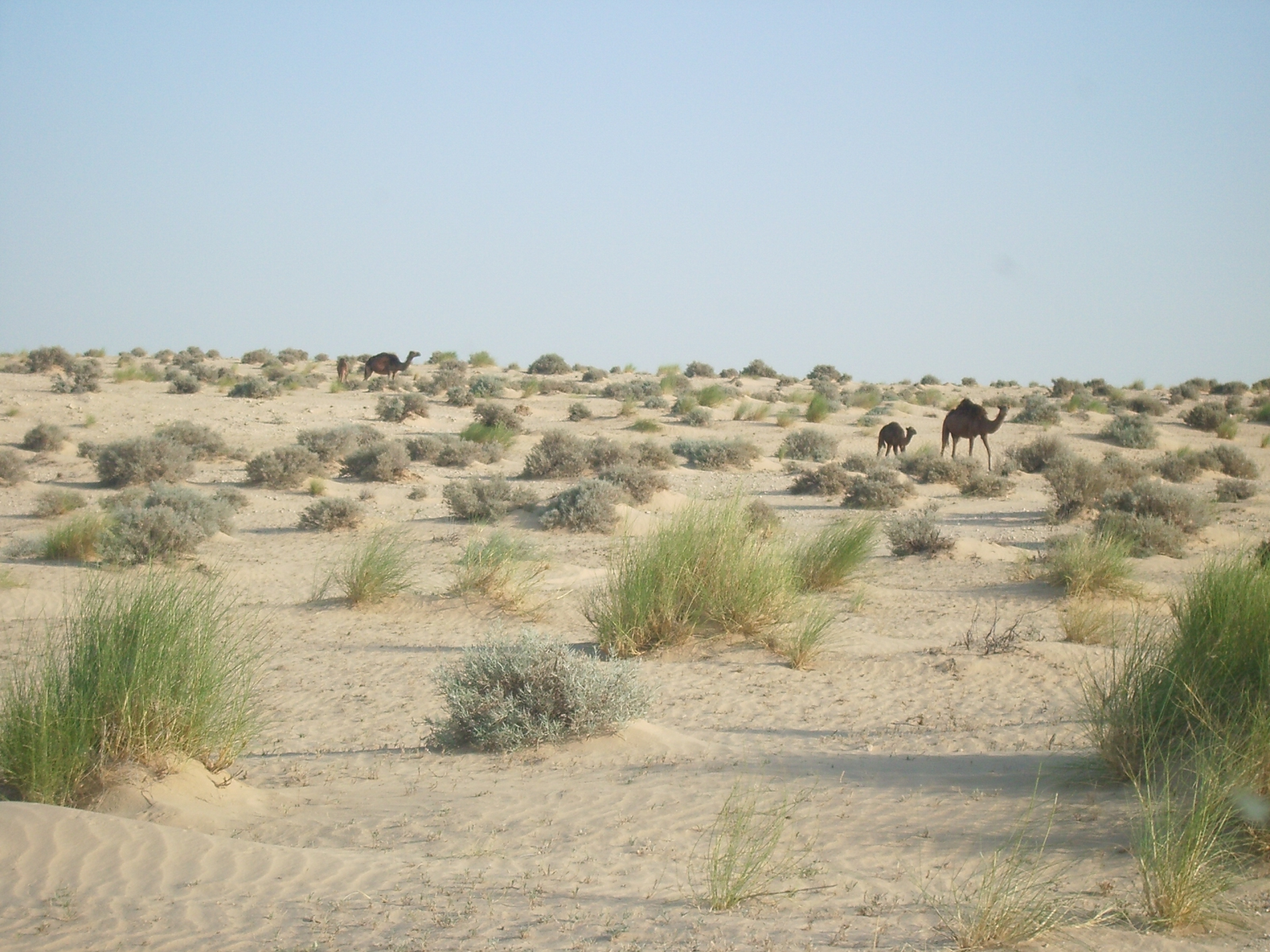 Camells salvatges a les dunes